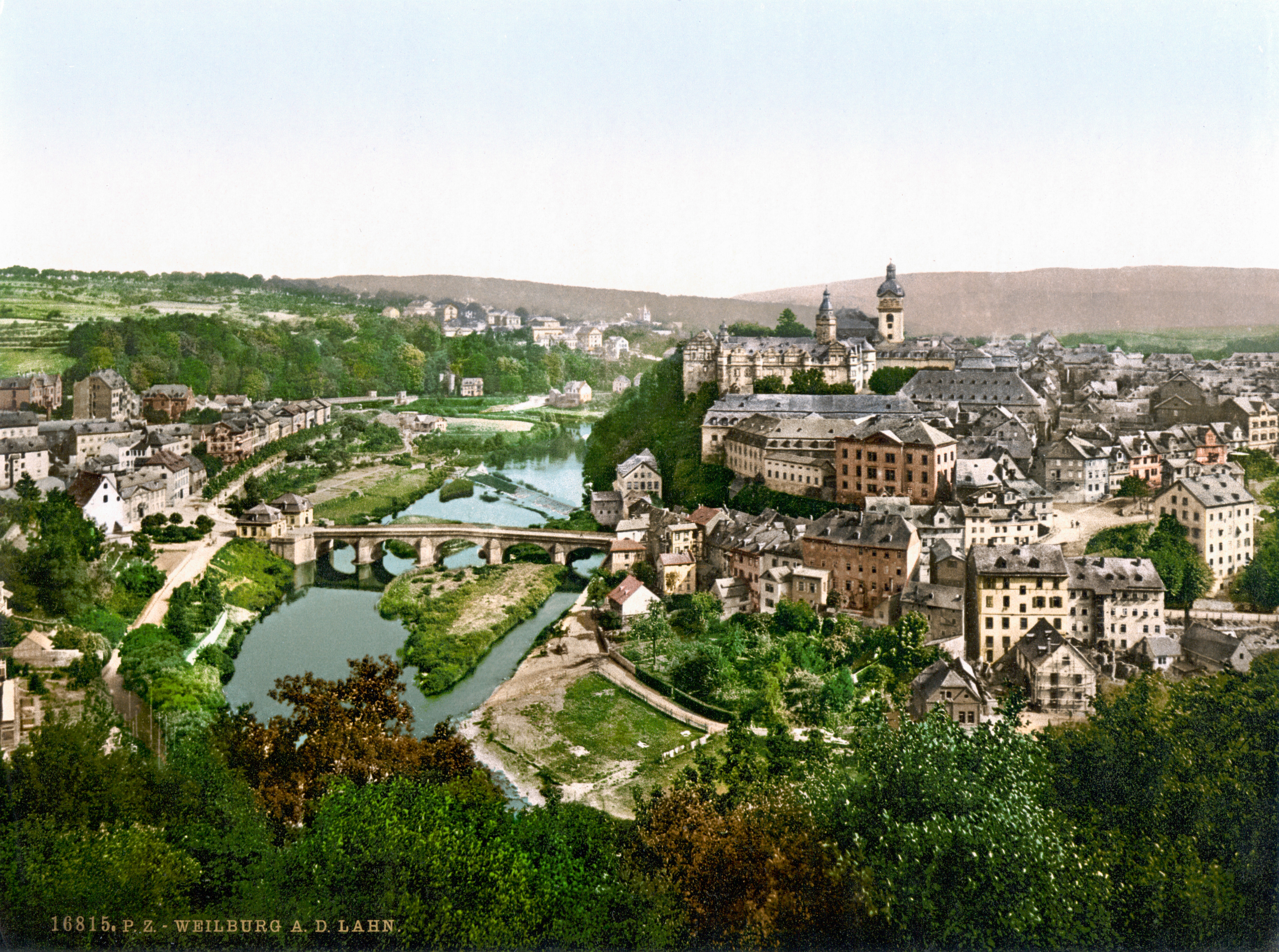 Weilburg